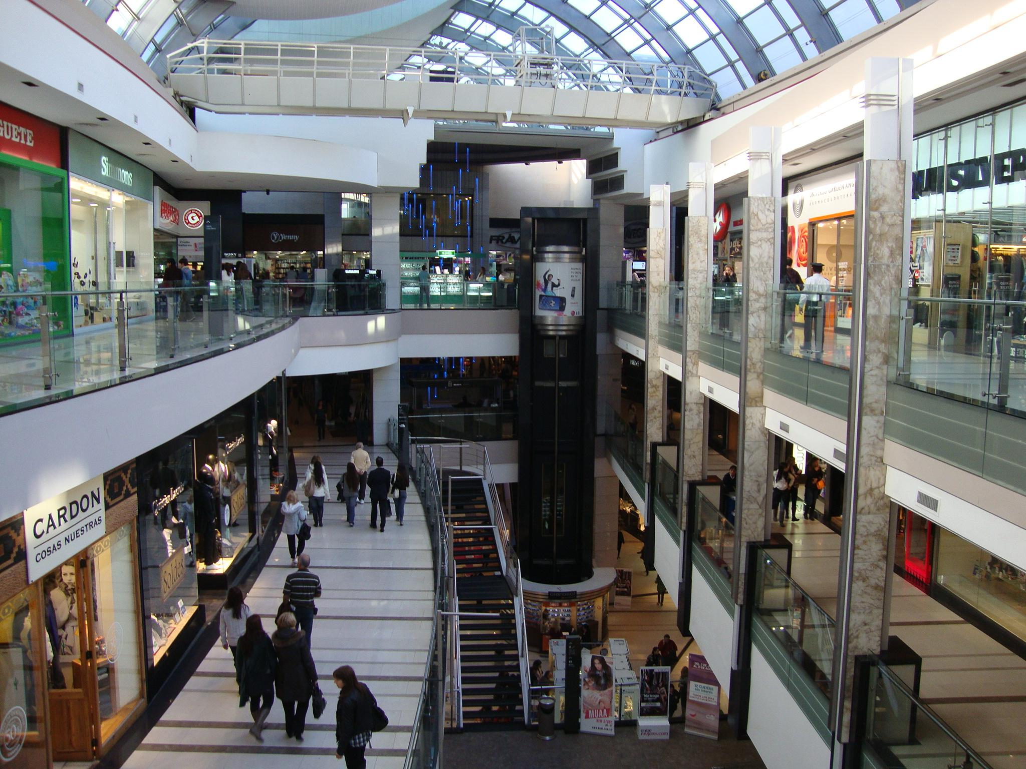 Vista del interior del centro comercial Alto Palermo, construido en 1990 en la Avenida Santa Fe esquina Av. Coronel Díaz. Buenos Aires, Argentina.